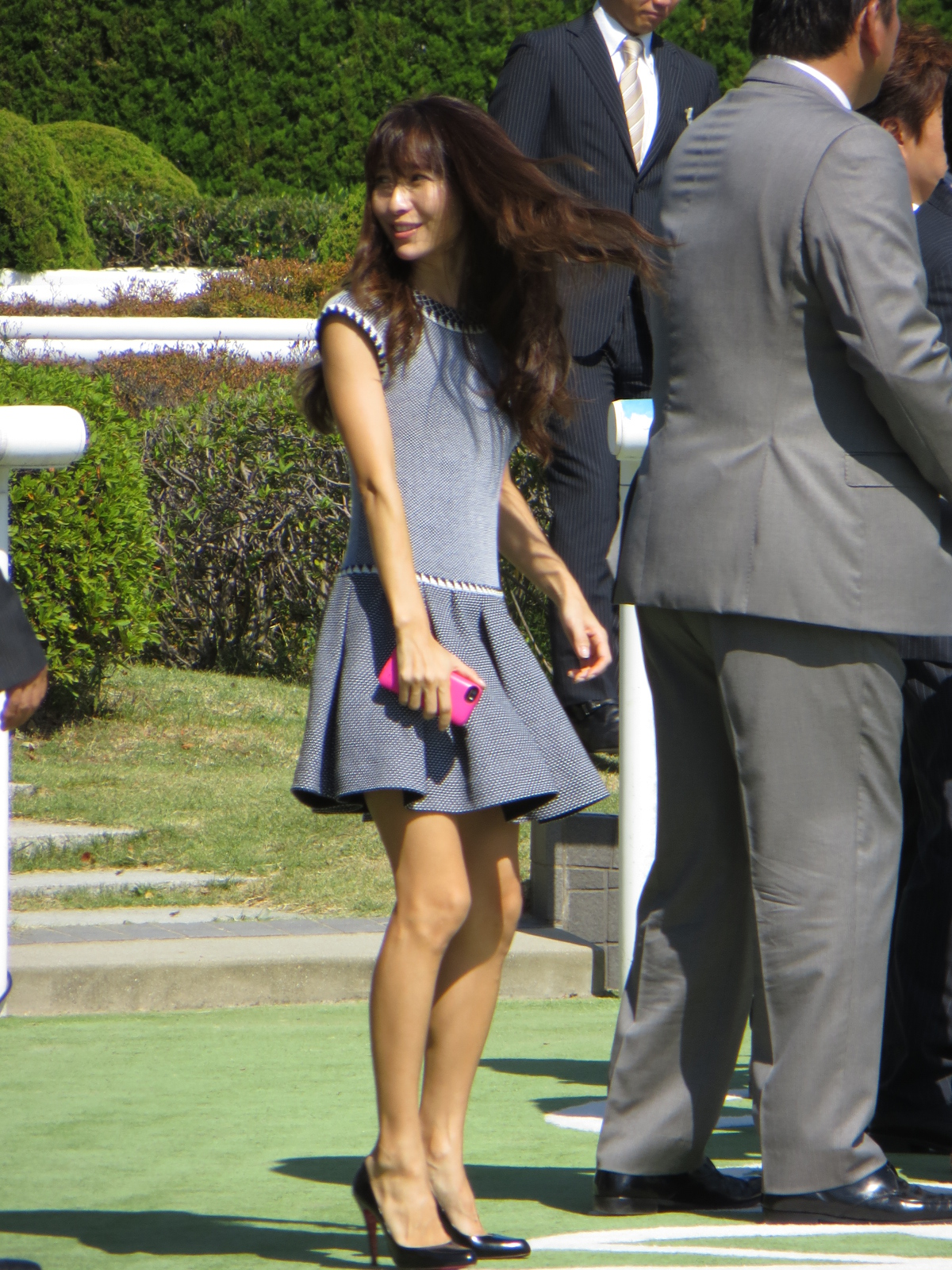 今さらながら・・・細っ(； ･`д･´)